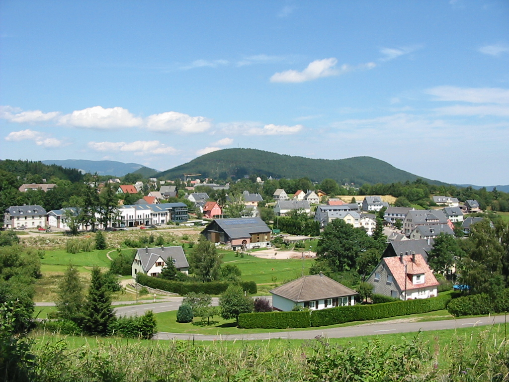 Vue panoramique de Labaroche (Haut-Rhin) depuis le lieudit Les Chiais